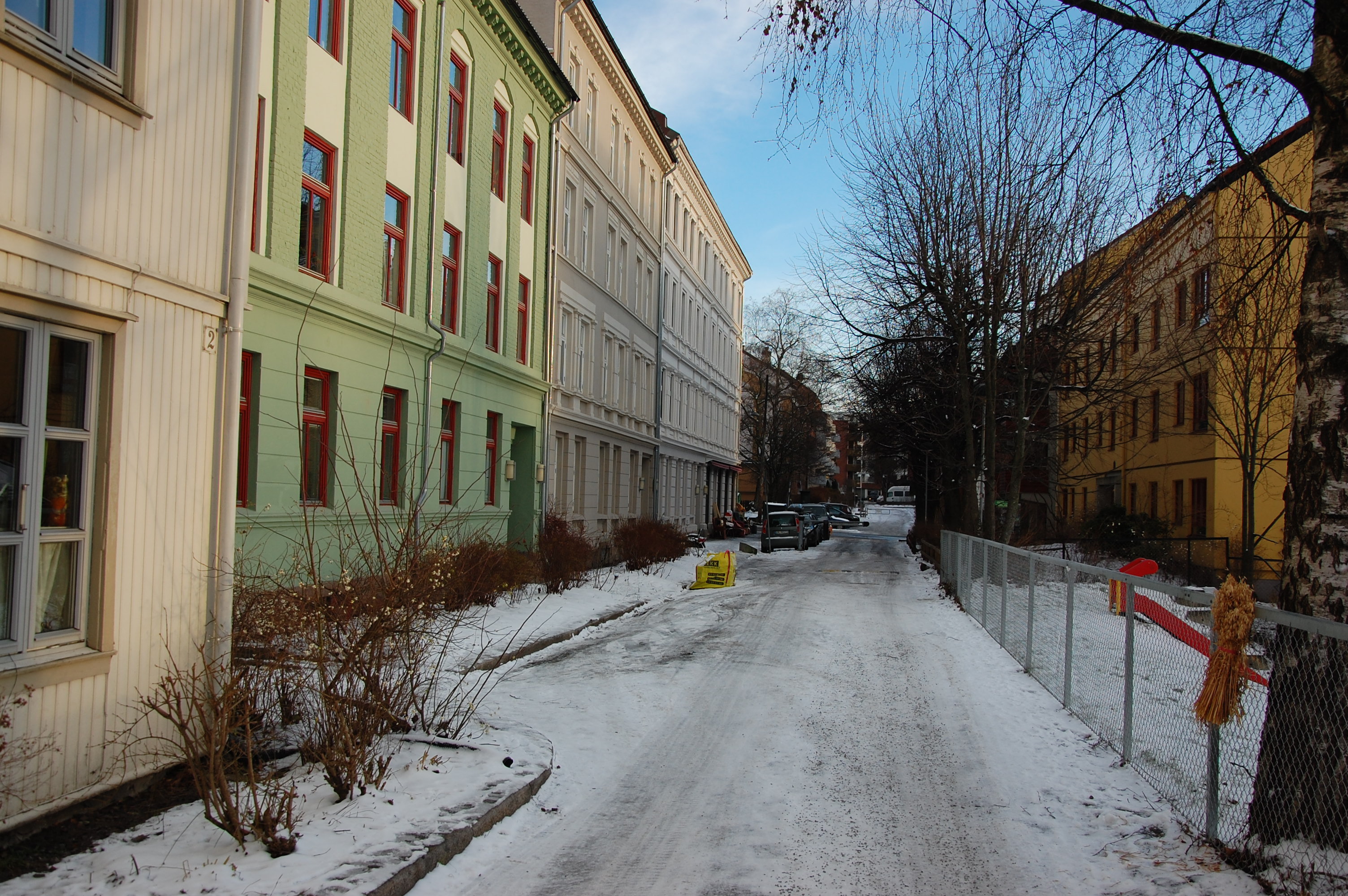 Kongsberggata på Bjølsen i Oslo sett fra nr 2 mot Bergensgata.